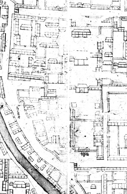 乾隆十五年（1750年）完成的《乾隆京城全图》中的福祥寺及其附近地区。本图来自清內務府藏京城全圖，故宮博物院影印，民國二十九年十二月（1940年）。福祥寺东、西两部分原在该图的不同页，故本图为本人拼接而成，拼接时难免有差错，请自行查阅原图校对。